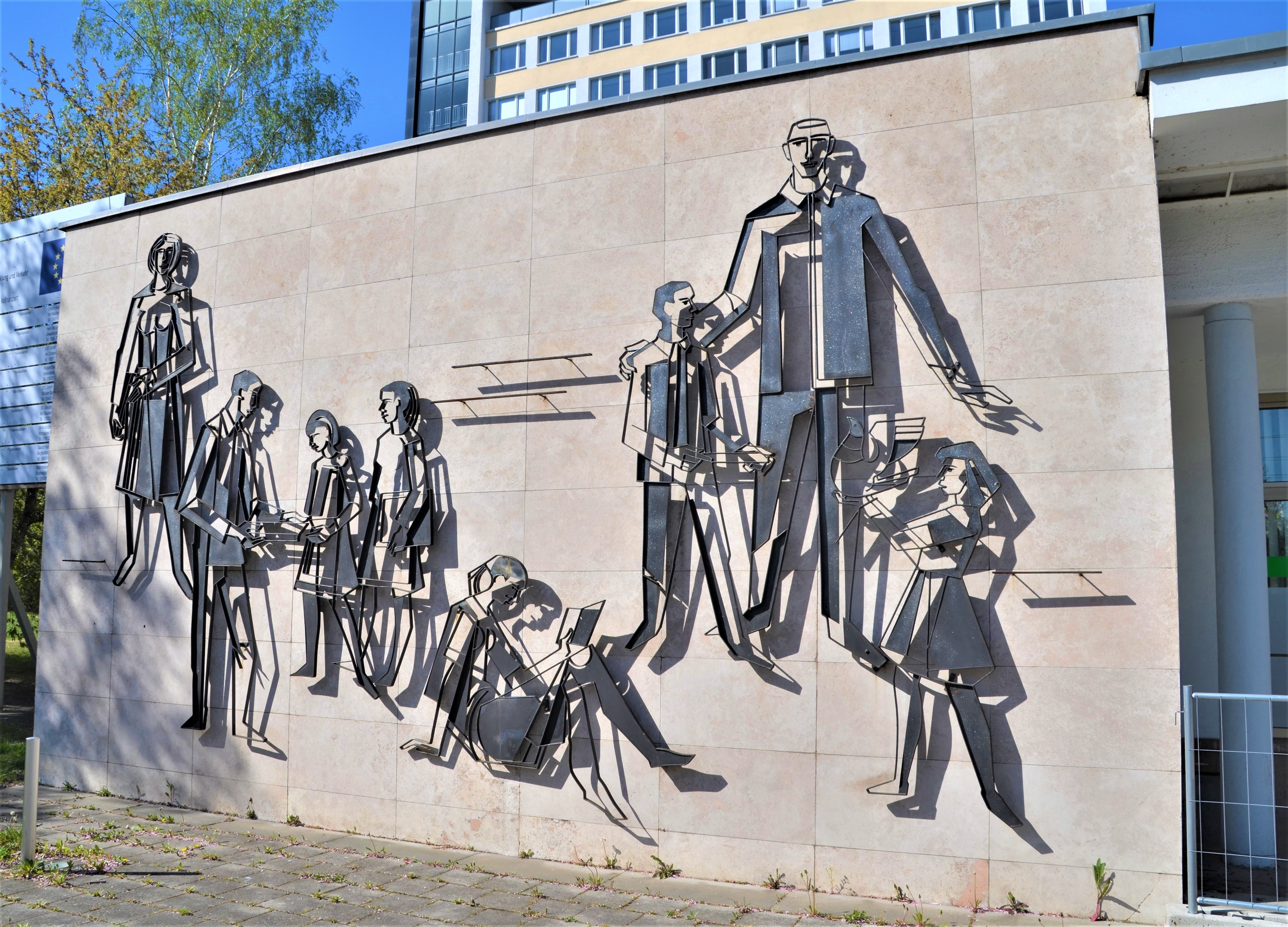 Relief am Eingang der Uni Erfurt